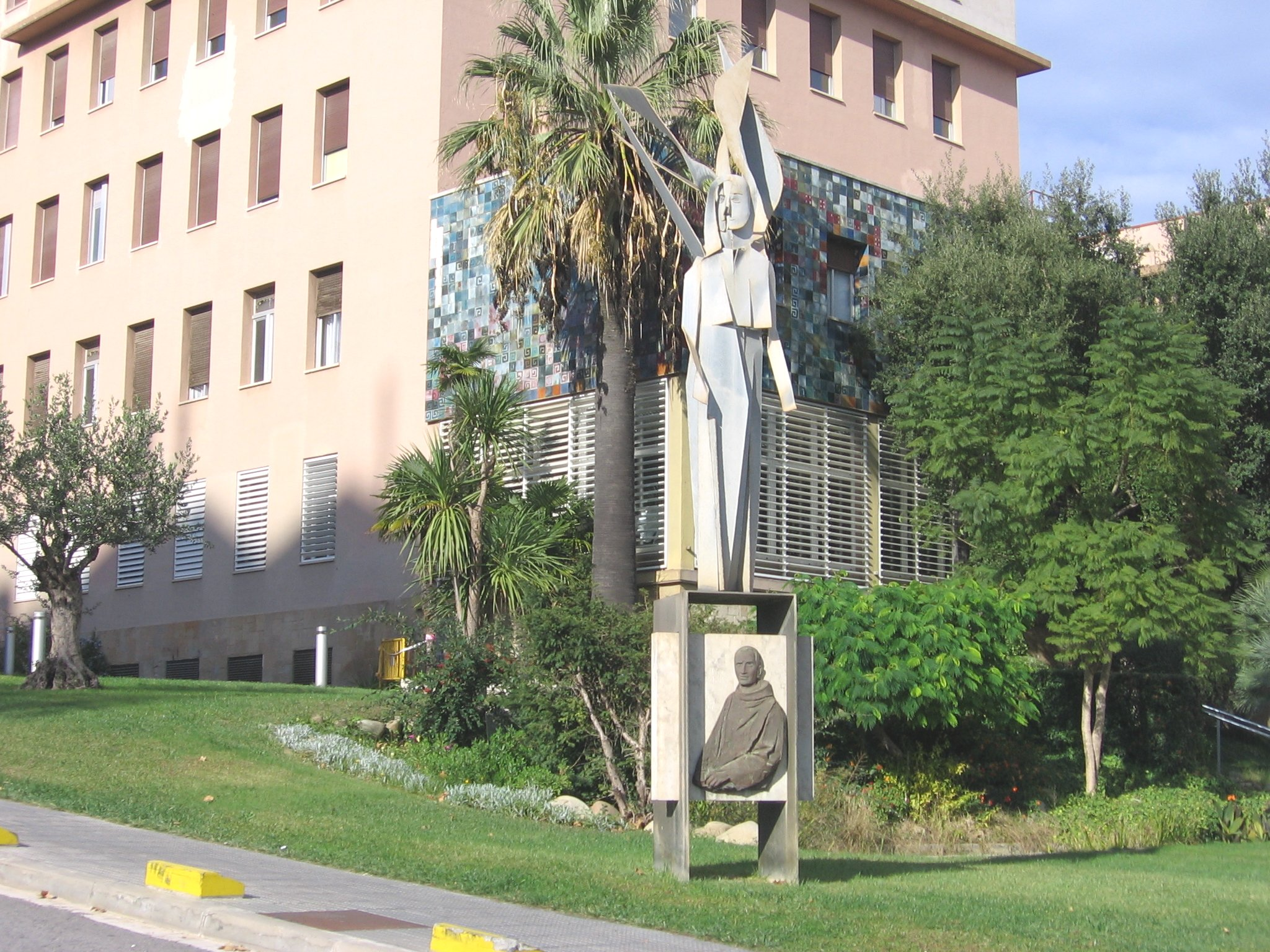 San Rafael, Hospital de San Rafael (Barcelona), de Domènec Fita.